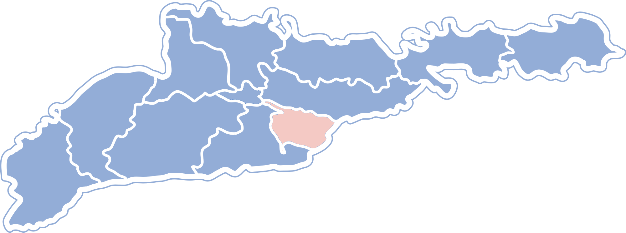 Hertsaivskyi-Raion map